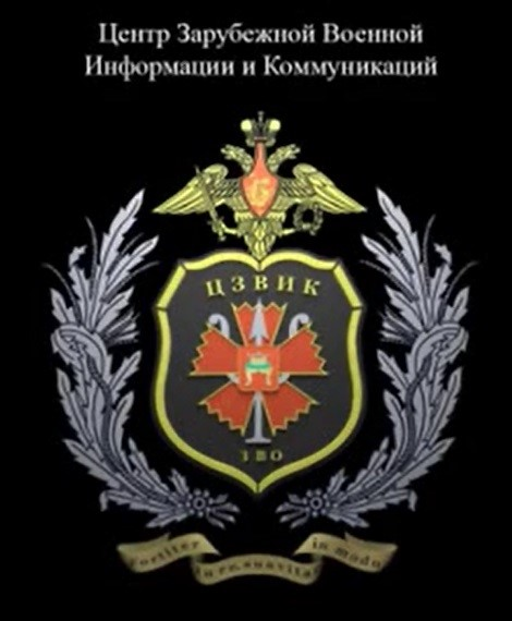 эмблема